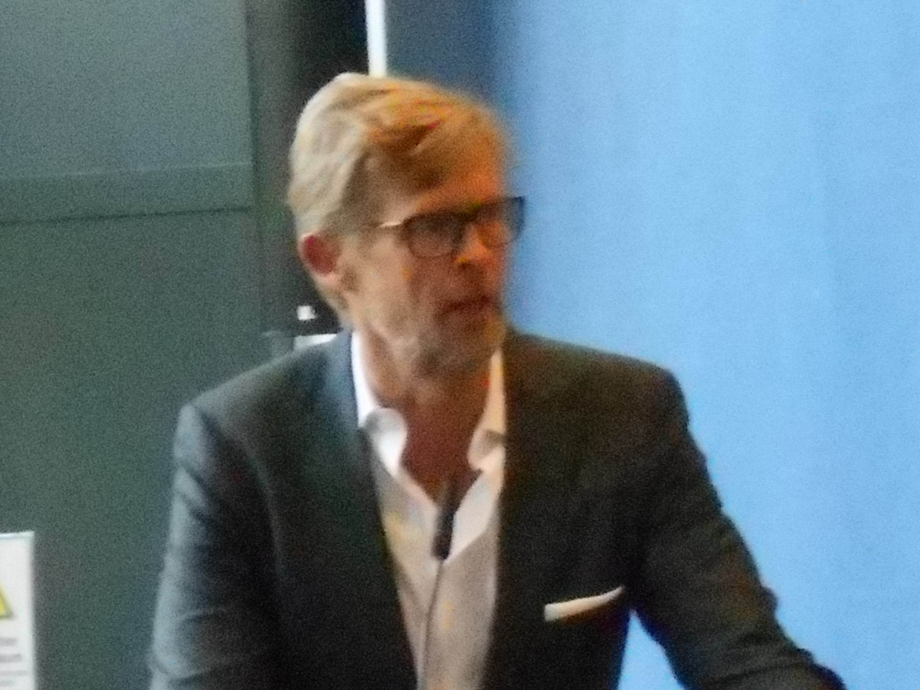 Der deutsche Historiker Andreas Brämer